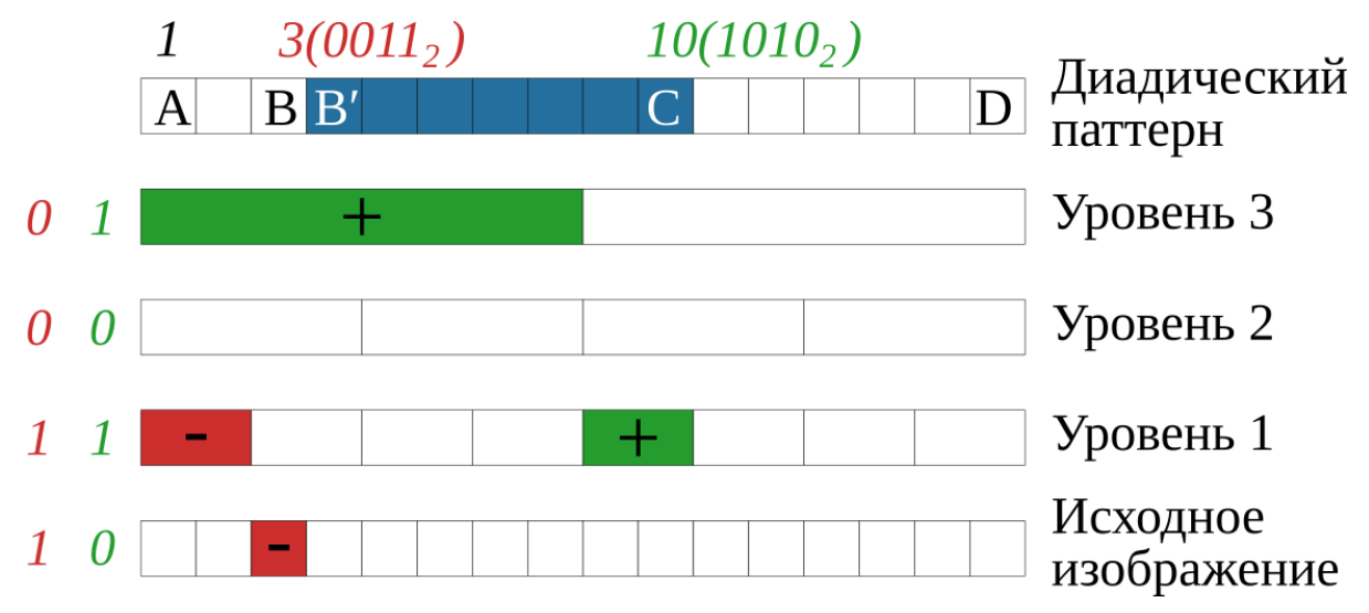 Пример получения произвольного отрезка на диадической прямой через паттерны, посчитанные БПХ.